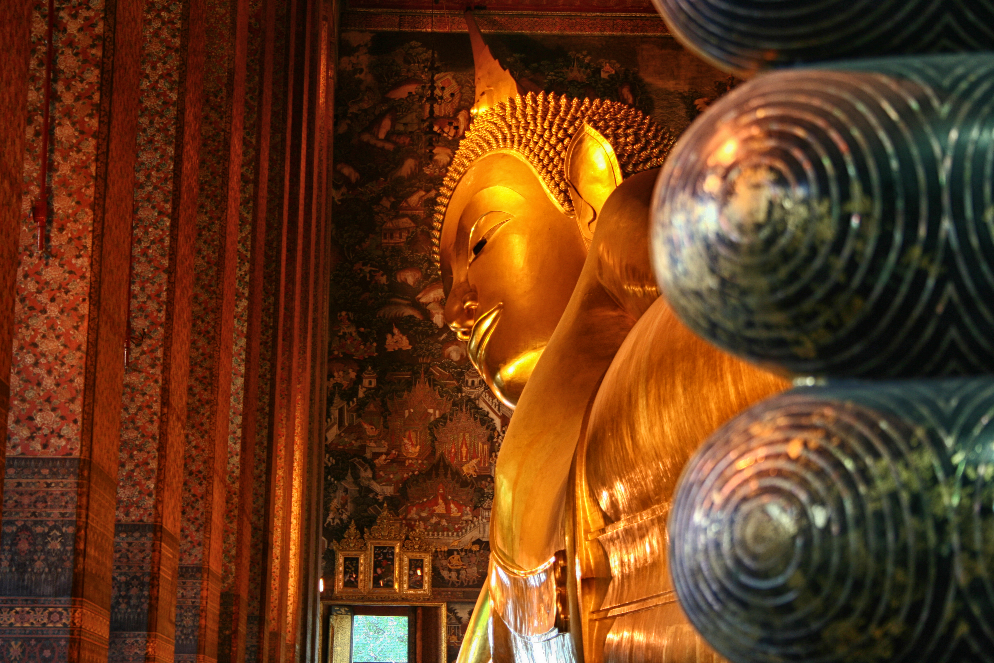 วัดพระเชตุพนวิมลมังคลารามราชวรมหาวิหาร (/พฺระ-เชด-ตุ-พน-วิ-มน-มัง-คฺลา-ราม/[1]) หรือ วัดโพธิ์ เป็นวัดสำคัญแห่งหนึ่งของประเทศไทย จัดเป็นพระอารามหลวงชั้นเอก ชนิดราชวรมหาวิหาร และเป็นวัดประจำรัชกาลในรัชกาลที่ 1 ทั้งยังเปรียบเสมือนเป็นมหาวิทยาลัยแห่งแรกของประเทศด้วย เนื่องจากเป็นที่รวมจารึกสรรพวิชาหลายแขนง และทางยูเนสโก ได้ขึ้นทะเบียนเป็นมรดกความทรงจำโลกของภูมิภาคเอเชียแปซิฟิก เมื่อ มีนาคม พ.ศ. 2551[2] และวันที่ 16 มิถุนายน 2554 ทางยูเนสโก ได้ขึ้นทะเบียนจารึกวัดโพธิ์จำนวน 1,440 ชิ้น เป็นมรดกความทรงจำโลก ในทะเบียนนานาชาติ วัดพระเชตุพนวิมลมังคลารามราชวรมหาวิหารถือได้ว่าเป็นวัดที่มีพระเจดีย์มากที่สุดในประเทศไทย โดยมีจำนวนประมาณ 99 องค์[3] พระเจดีย์ที่สำคัญ คือ พระมหาเจดีย์สี่รัชกาล ซึ่งเป็นพระมหาเจดีย์ประจำพระบาทสมเด็จพระพุทธยอดฟ้าจุฬาโลกมหาราช พระบาทสมเด็จพระพุทธเลิศหล้านภาลัย พระบาทสมเด็จพระนั่งเกล้าเจ้าอยู่หัว และพระบาทสมเด็จพระจอมเกล้าเจ้าอยู่หัว ในแง่ของการท่องเที่ยวแล้ว วัดโพธิ์ได้รับความนิยมเที่ยวเป็นลำดับที่ 24 ของโลก ในปี พ.ศ. 2549 โดยมีนักท่องเที่ยวมาเยือนในปีนั้นถึง 8,155,000 คน